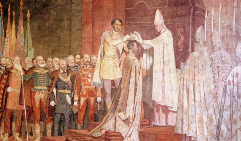 A király koronázása. - Székely Bertalan falfestménye a kecskeméti új városháza közgyűlési termében.